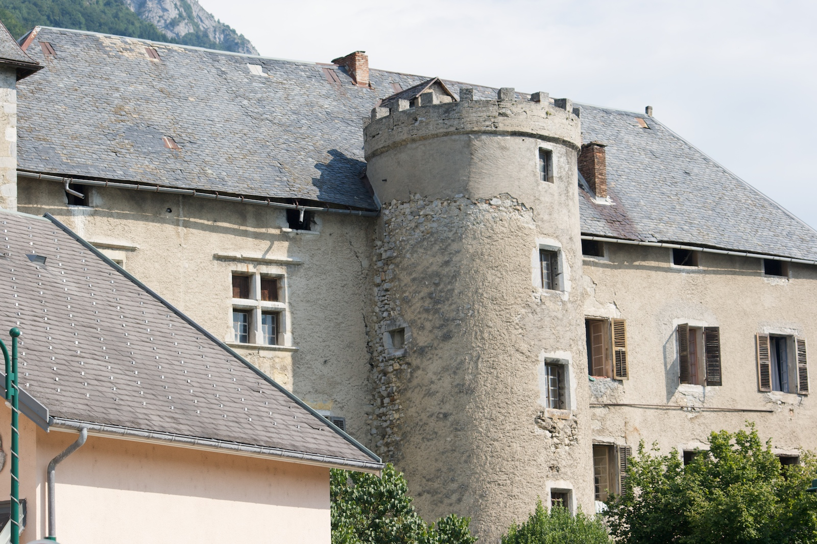 Chateau de Chevron